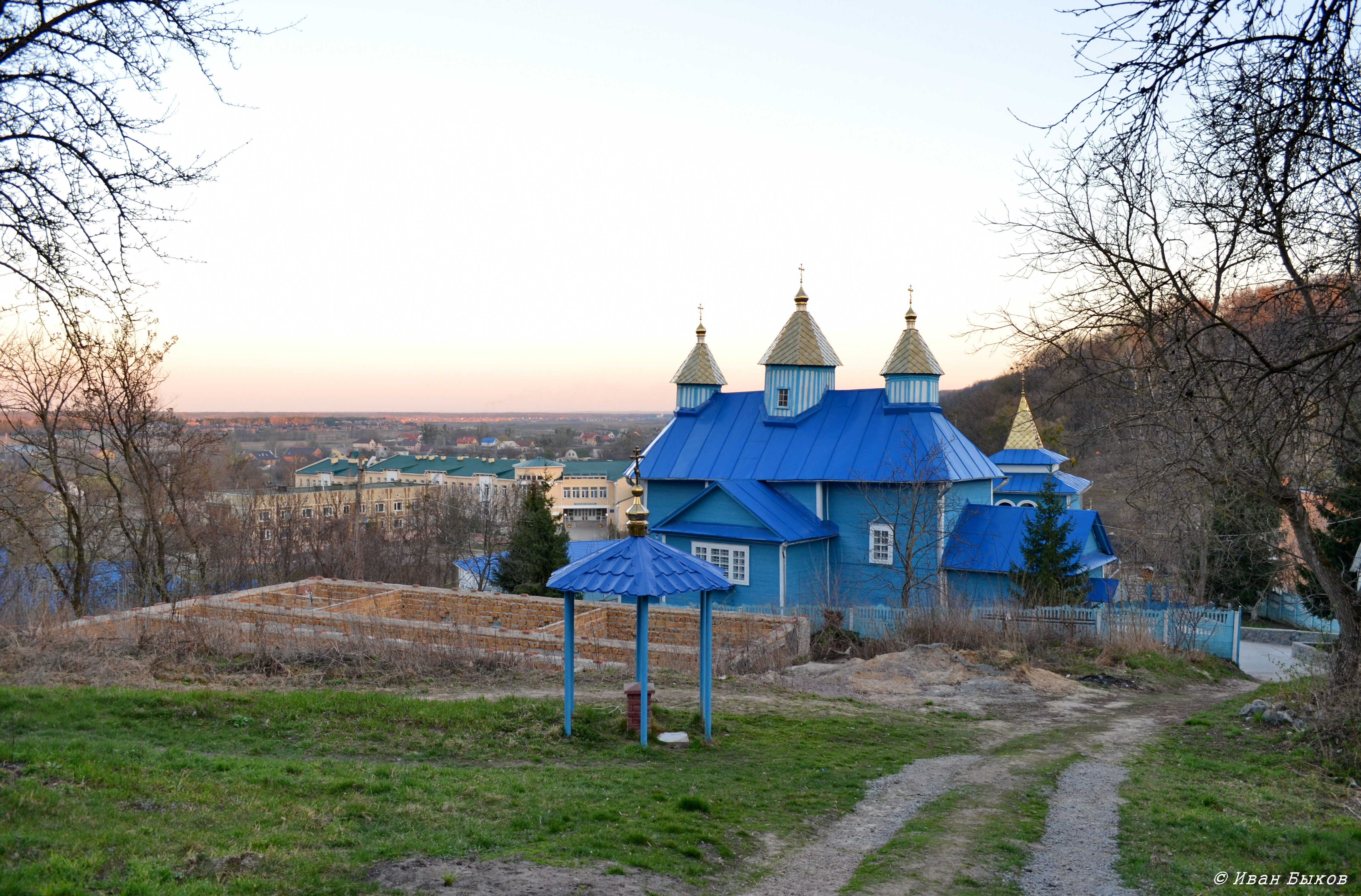 Миколаївська церква (дер.), село Підгірці